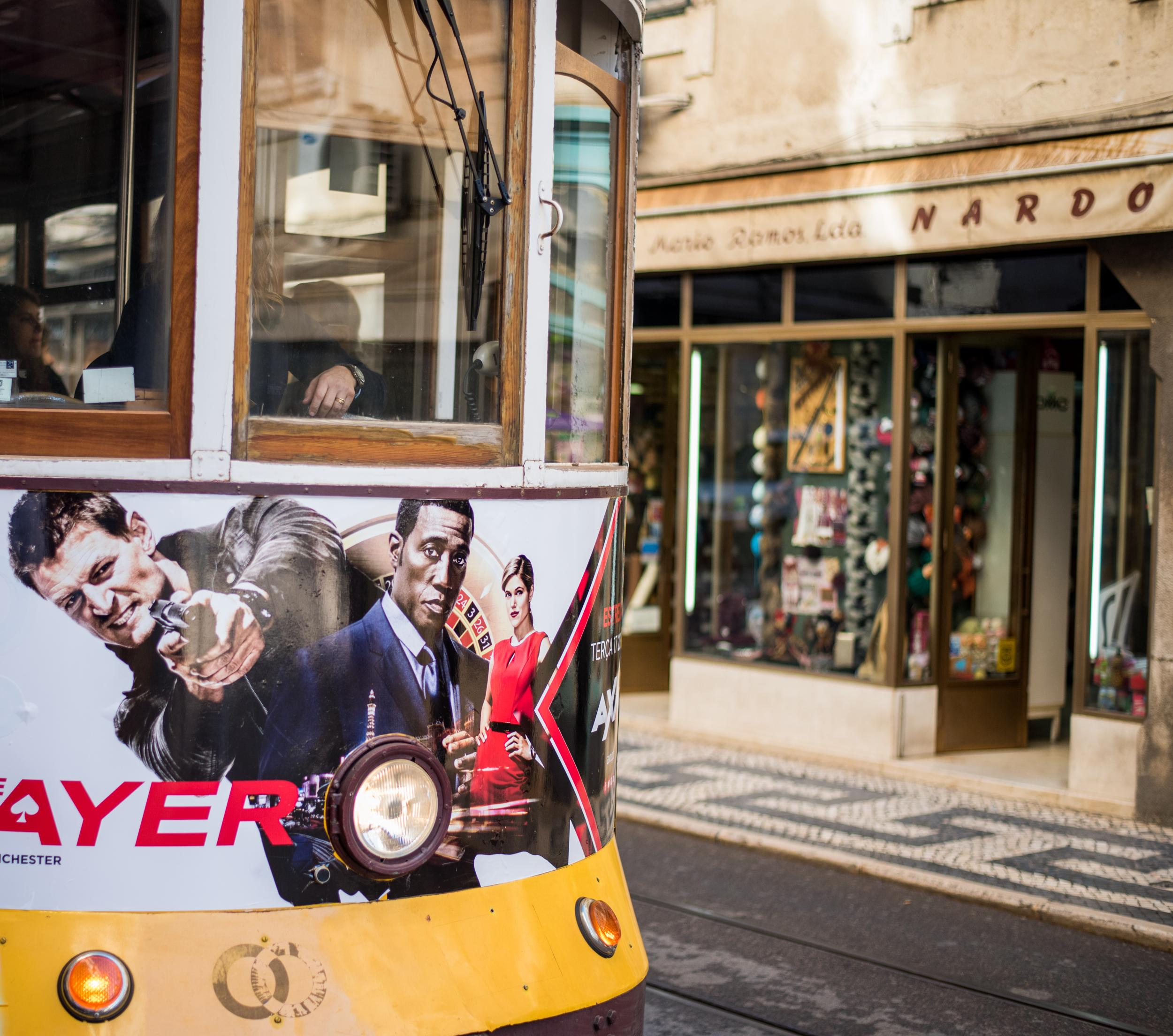 J'ai pris cette photo simplement parce que je trouvais que les couleurs se mariaient bien !! Et puis aussi parce que je ne me lasse pas de voir ce mythique tramway.